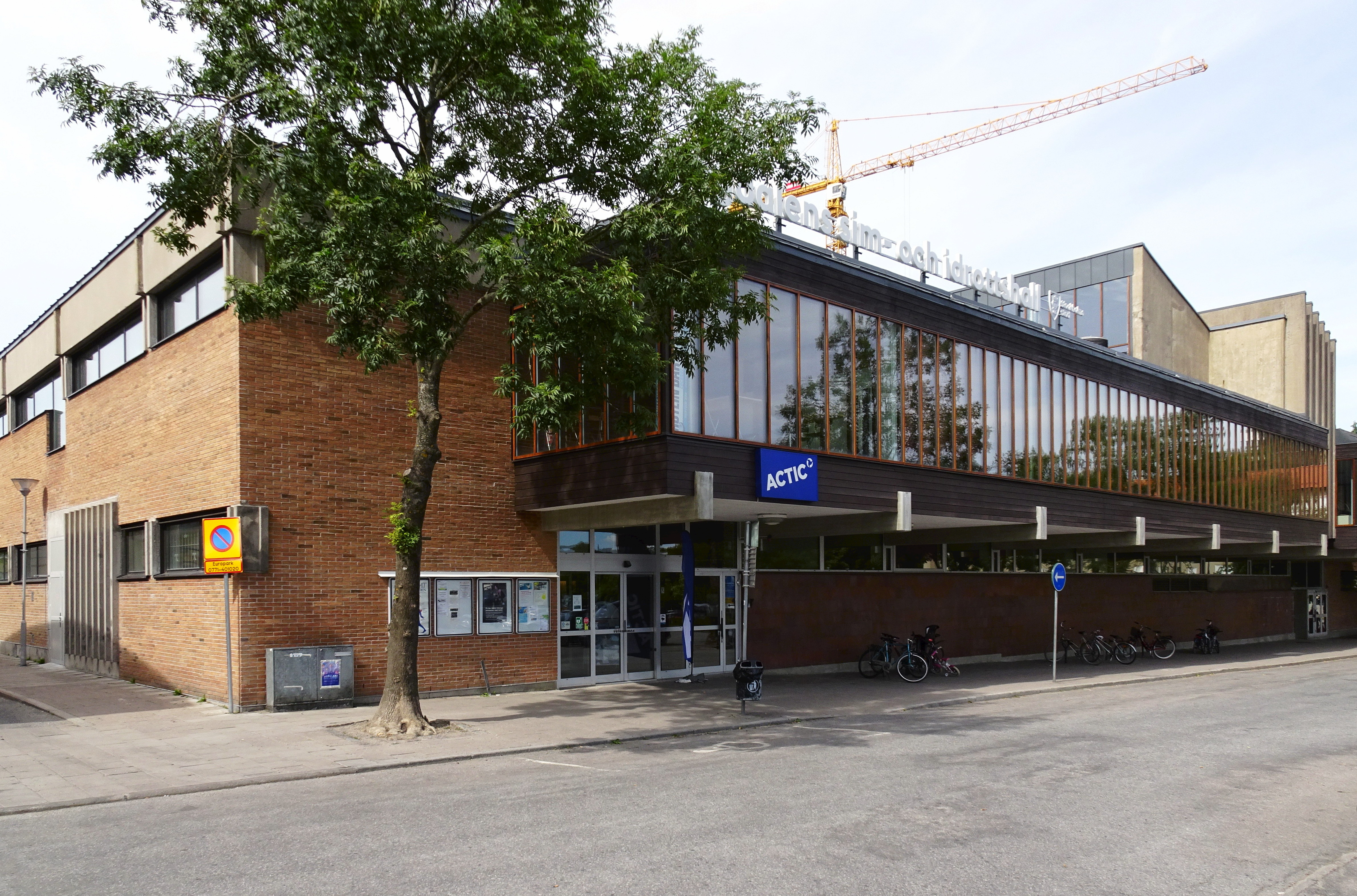 Högdalshallen, arkitekt Åke E. Lindqvist